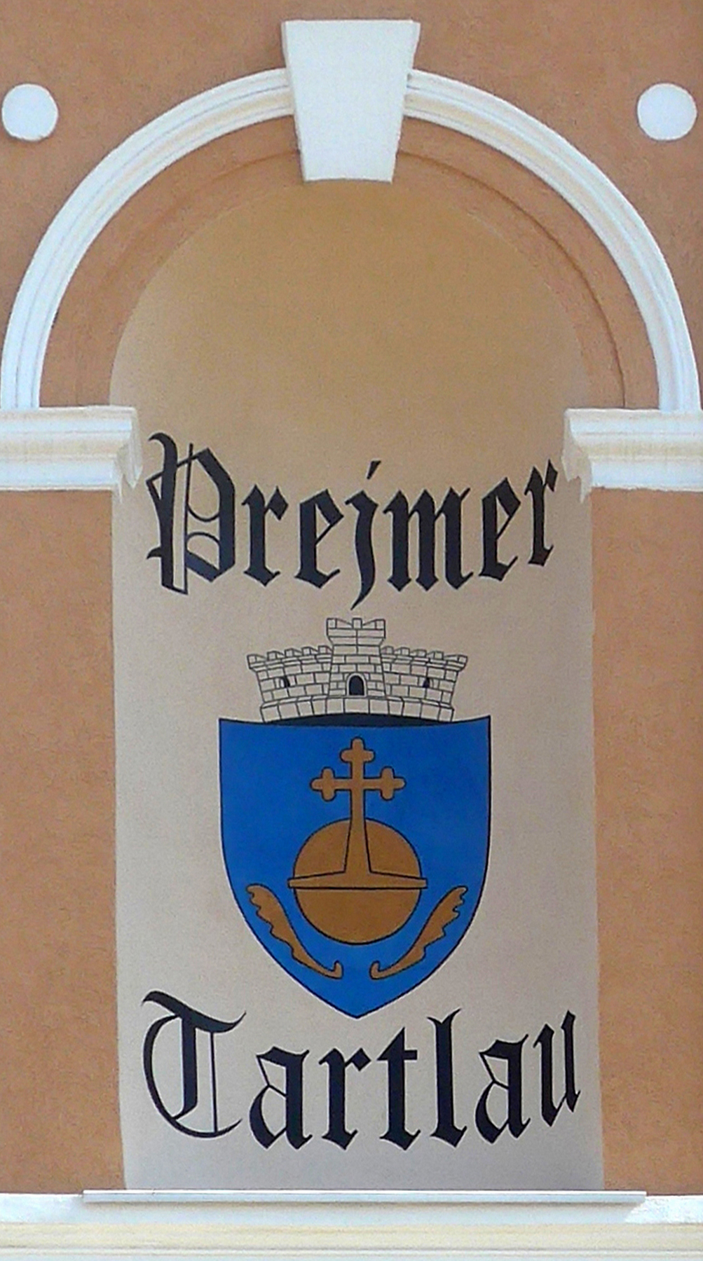 Das amtliche siebenbürgisch-sächsische Ortwappen von Tartlau am Rathaus in Prejmer/Tartlau (Rumänien)